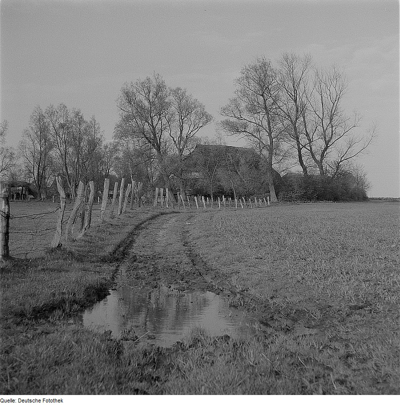 Original image description from the Deutsche FotothekRambin-Giesendorf. Windschutzbäume um einen Hof